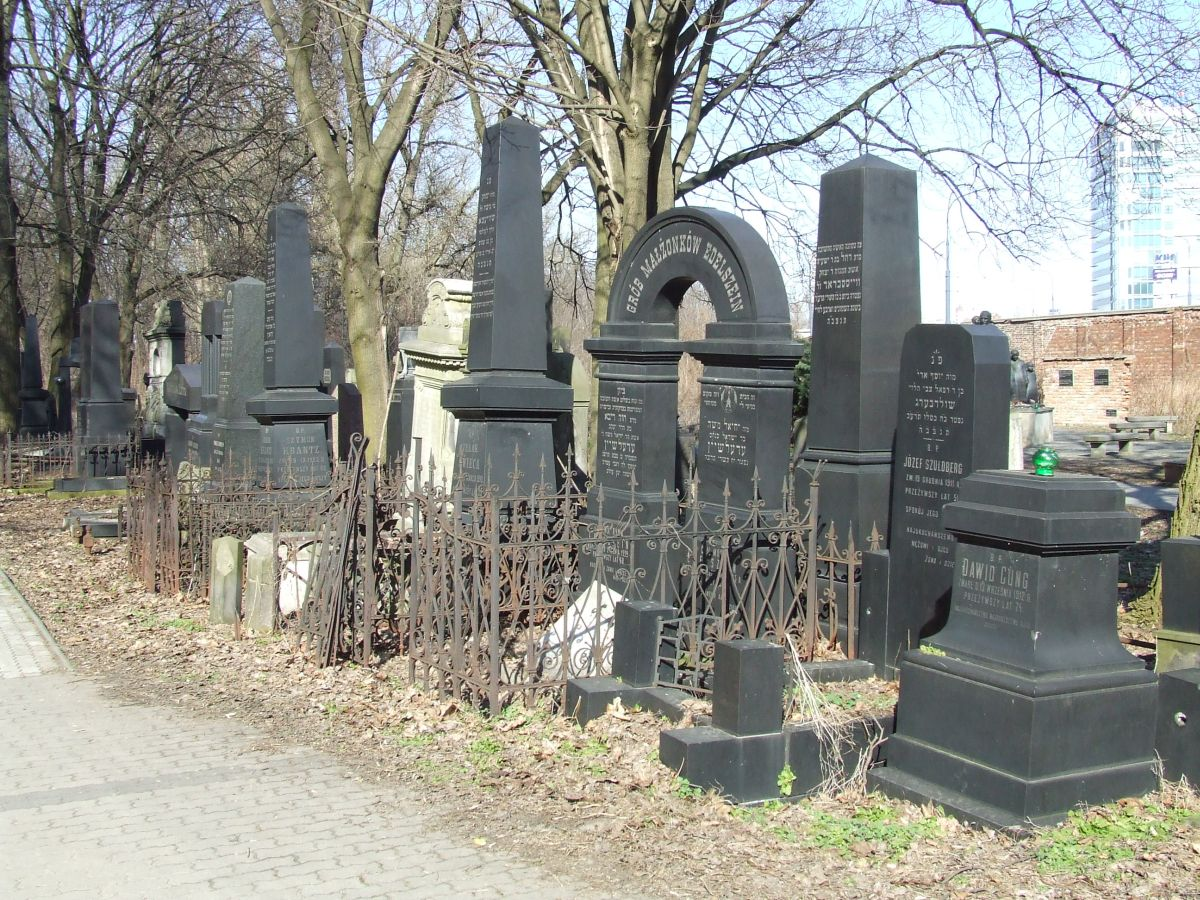 Nagrobki